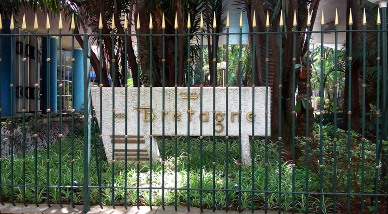 Placa do Edifício Bretagne, São Paulo (SP), Brasil